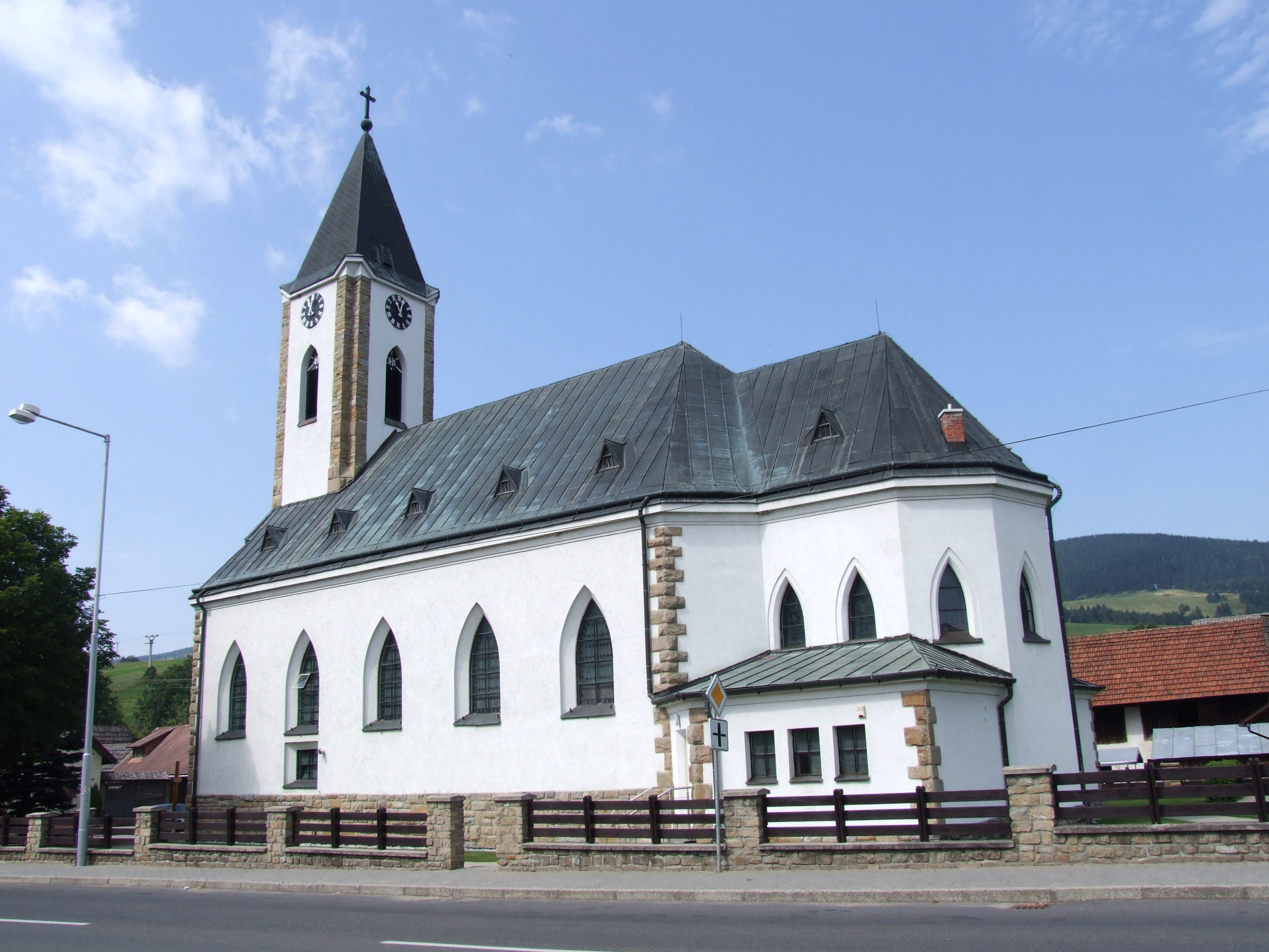 Zuberec church